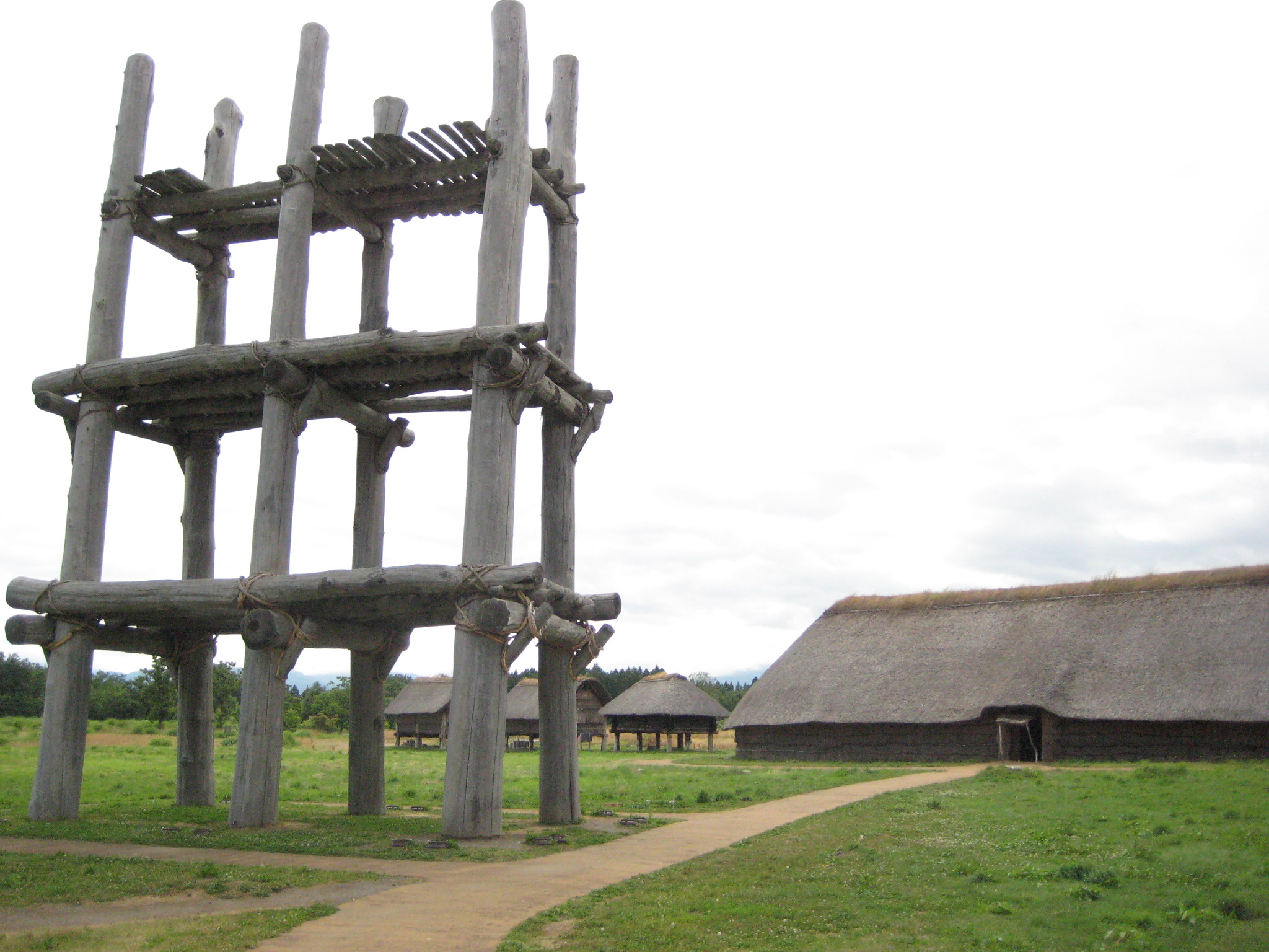 Tour a 6 pilones du site de Sannai Maruyama